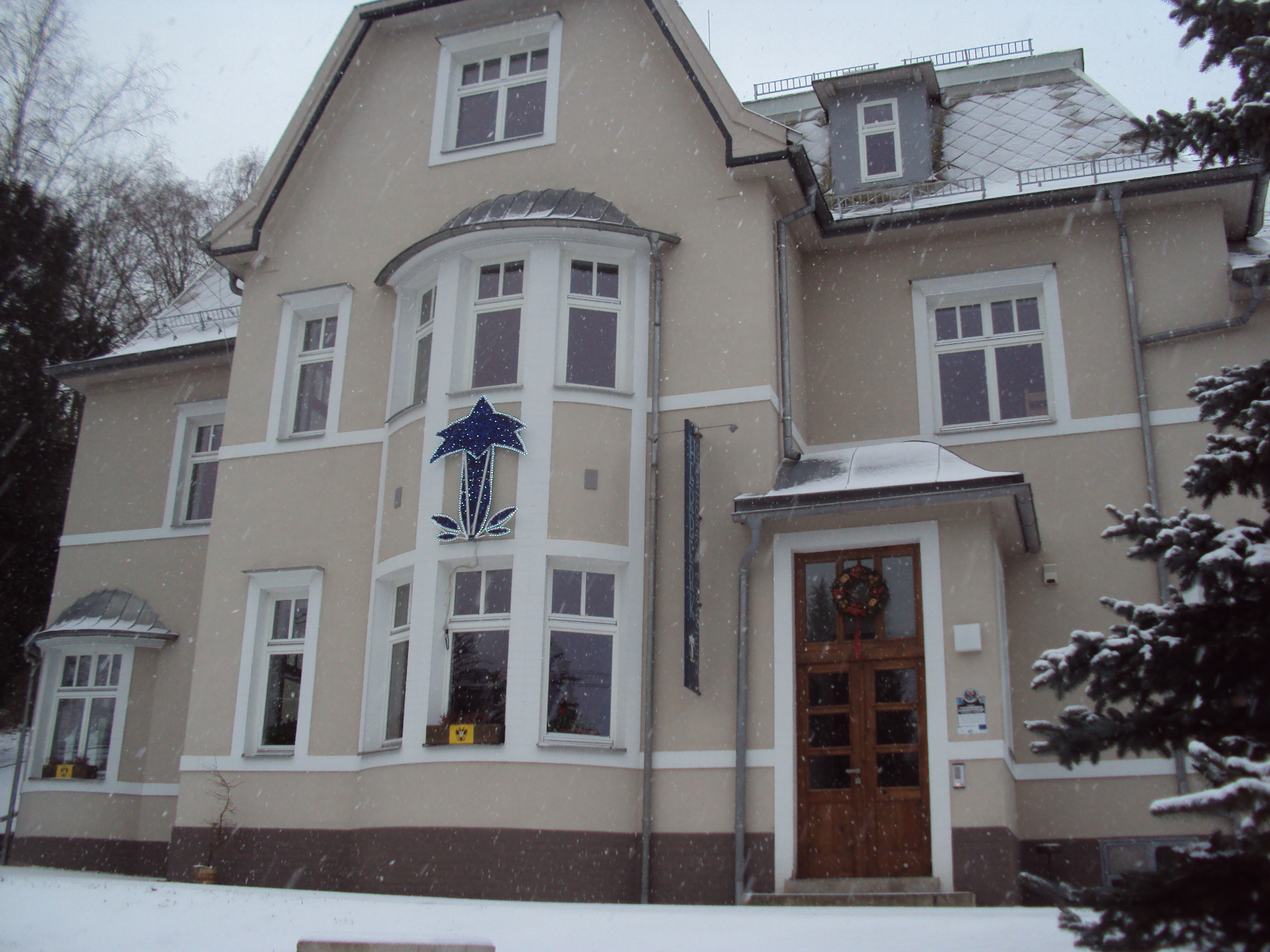 Ubytovna A-TOM ve Sloupu v Čechách